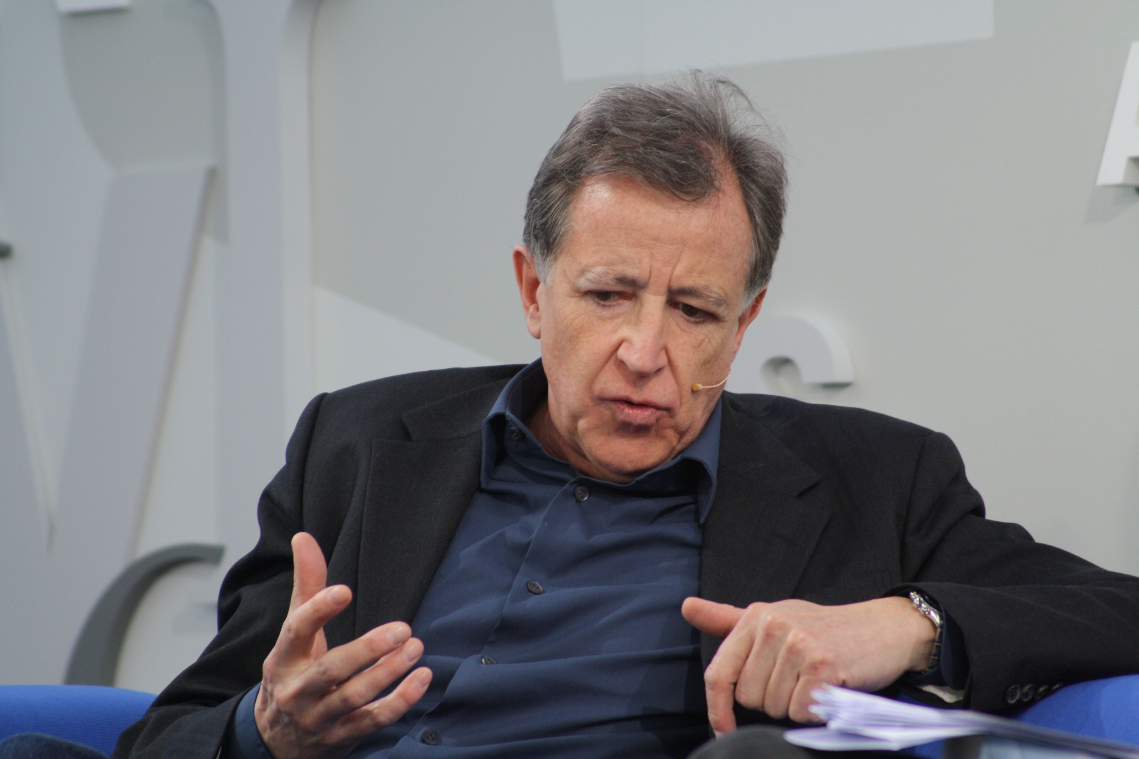 Der deutsche Schriftsteller Ernst-Wilhelm Händler stellt auf der Leipziger Buchmesse 2013 seinen Roman "Der Überlebende" vor.